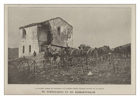 Съглашенска артилерия край Горничево в 1916